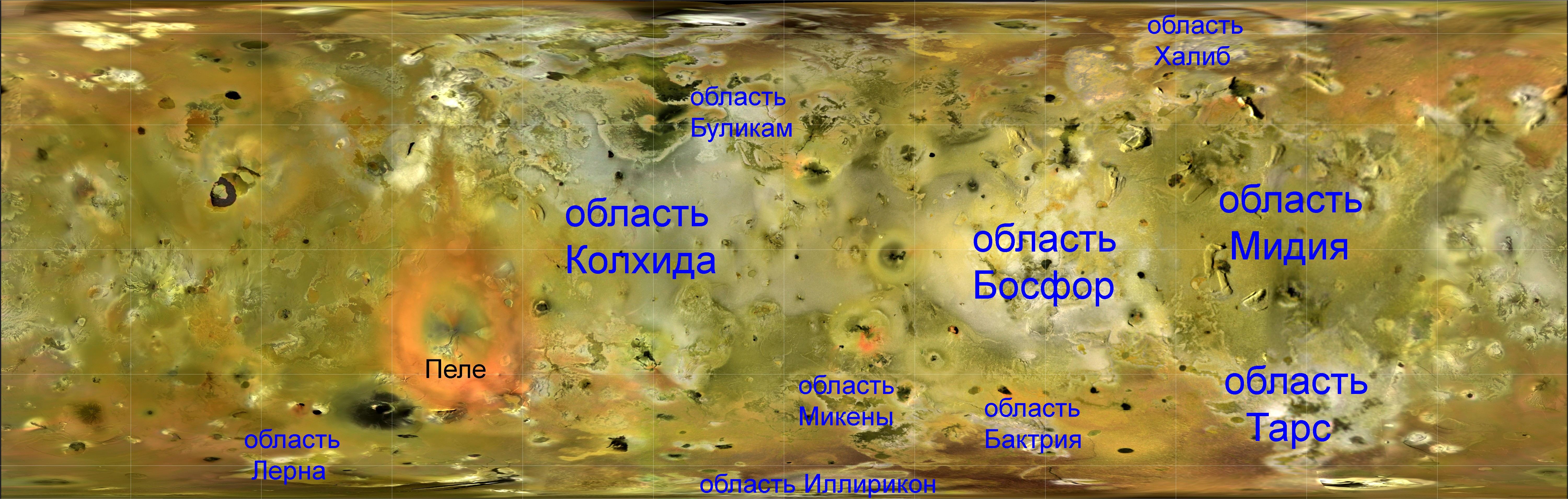 Карта Ио с указанием областей.